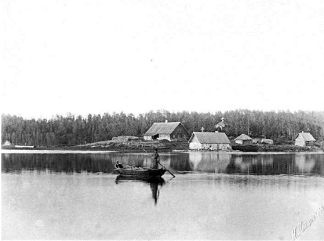 Соловецкий остров. Исаковский скит. Часовня и хозяйственные постройки.